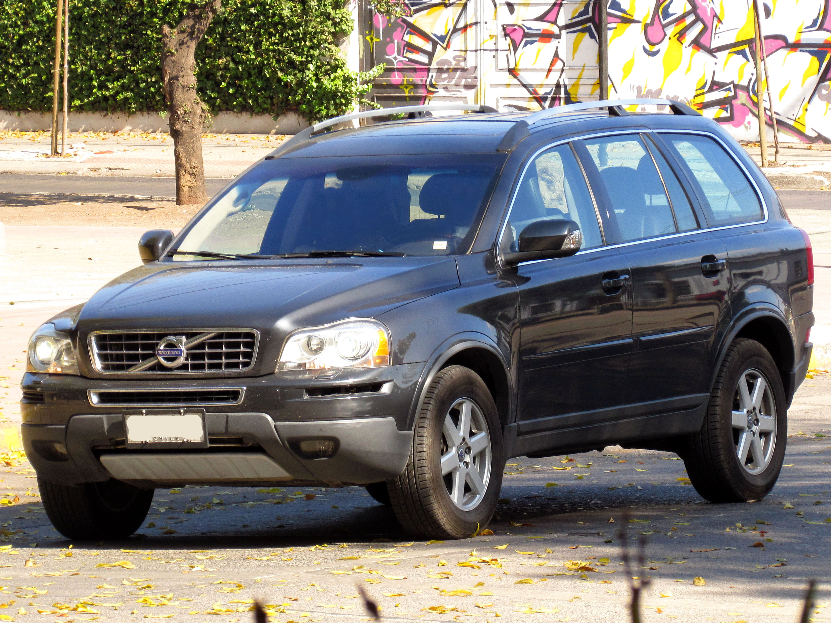 Volvo XC 90 D5 AWD 2011